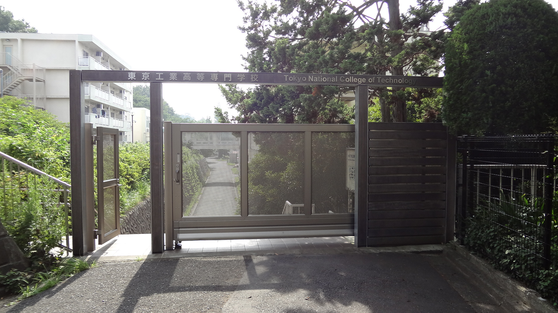 東京高専西門